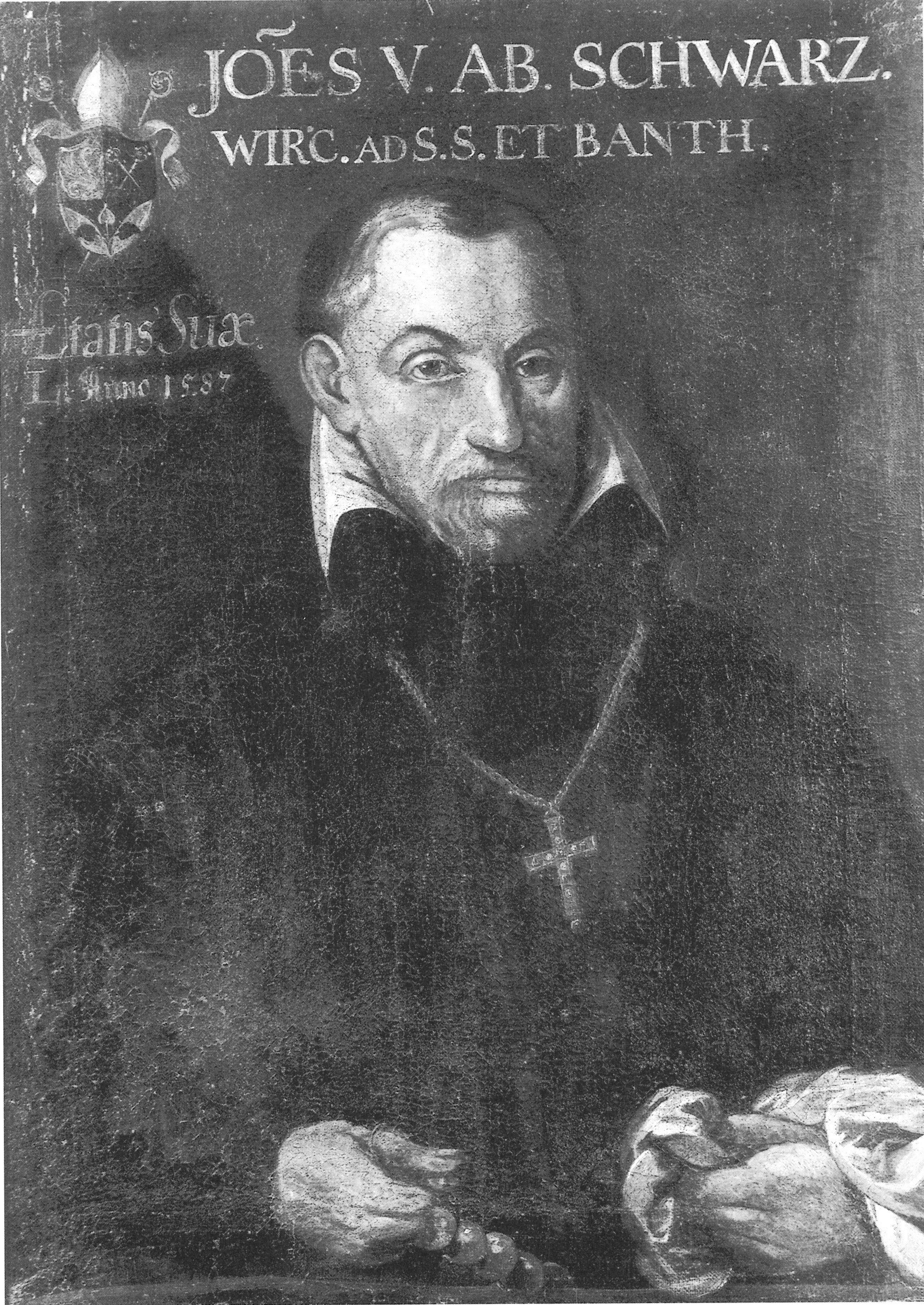 Abtporträt, Johannes IV. Burckhardt